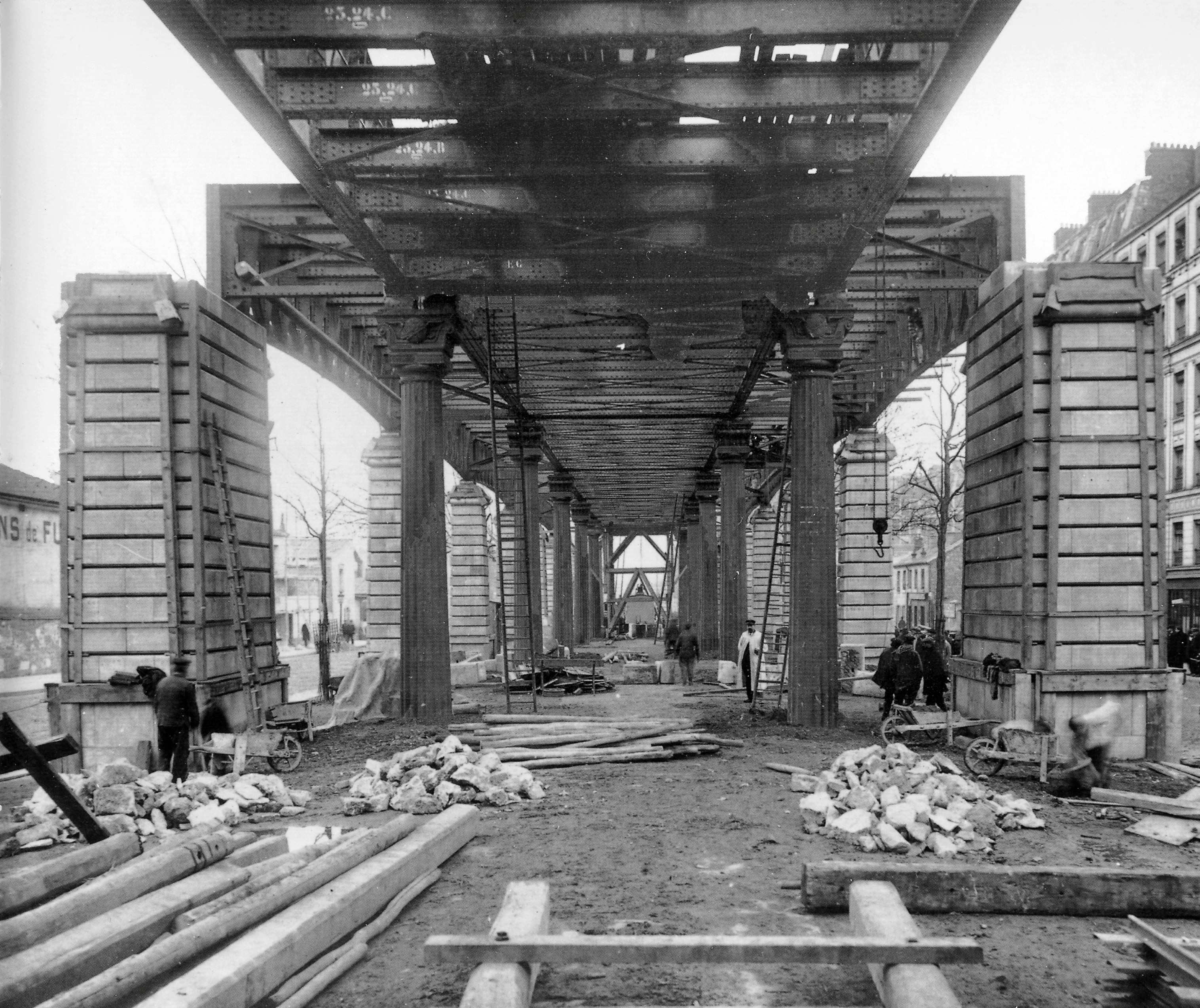 Station chevaleret en construction Ets Armand, Moisant, Savey Photo vers 1905, domaine public